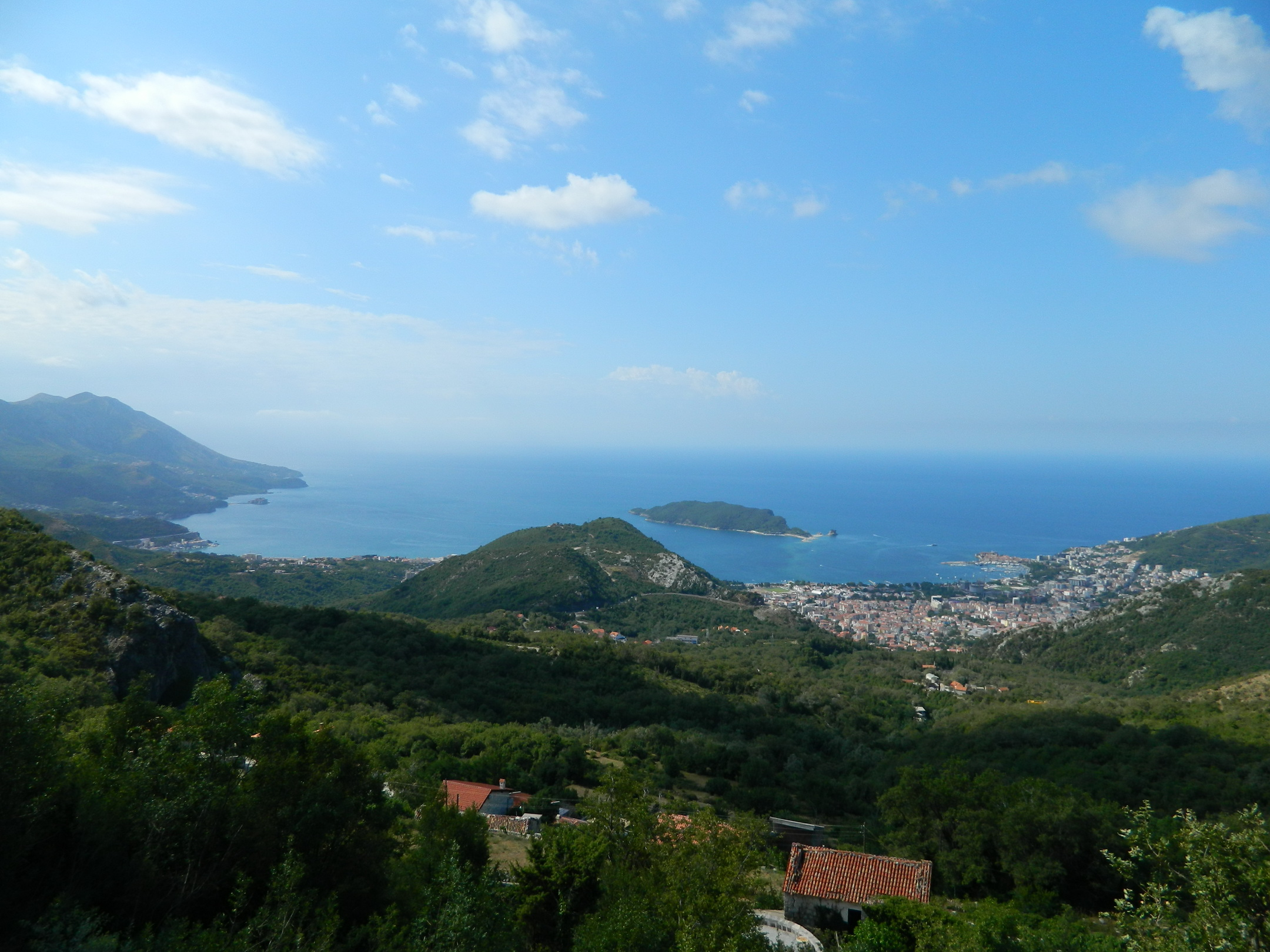 Вид на Будванскую ривьеру